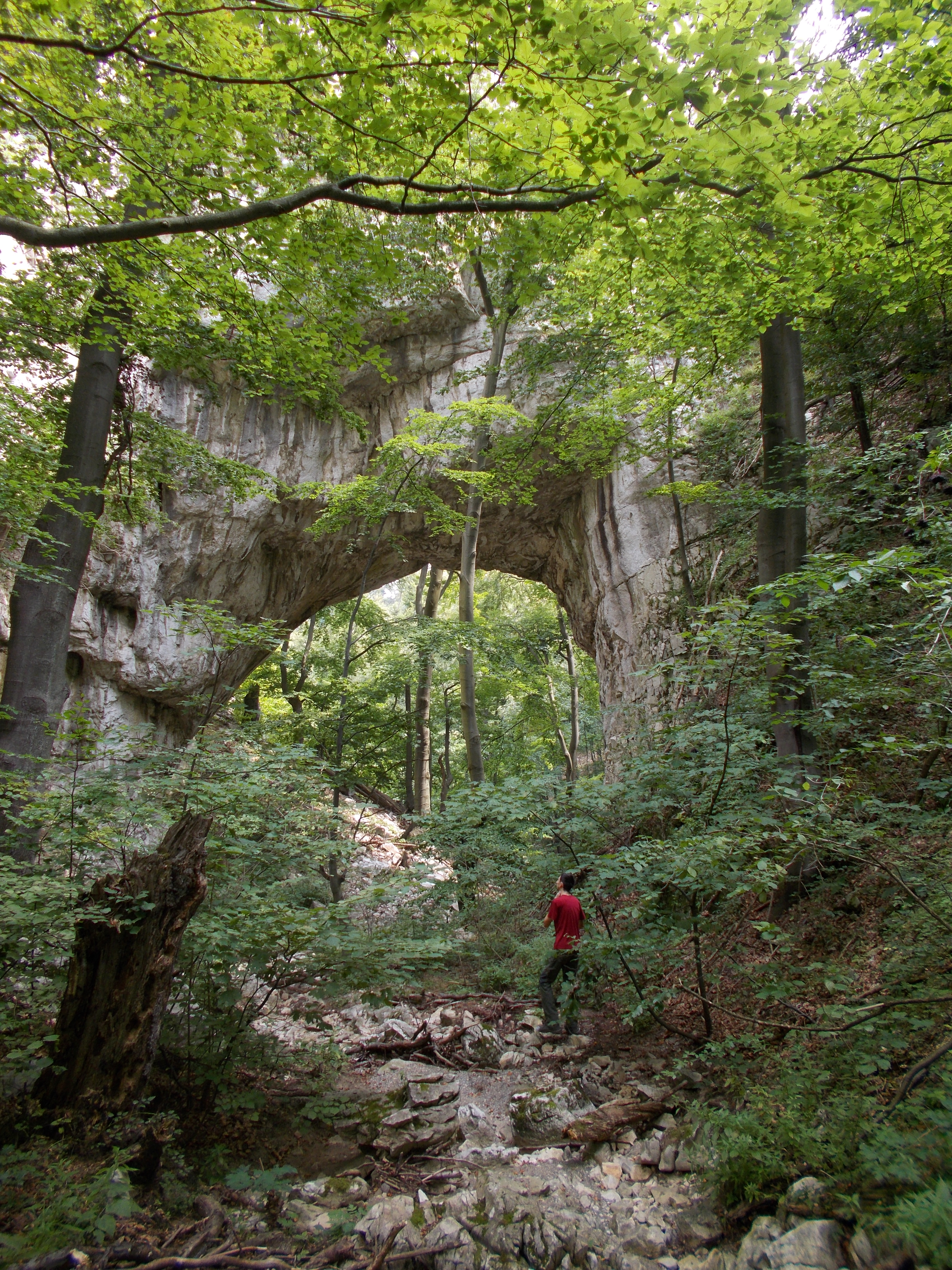 Прераст Самар на речици Пераст близу Жагубице и Борског језера, сликана са узводне стране.